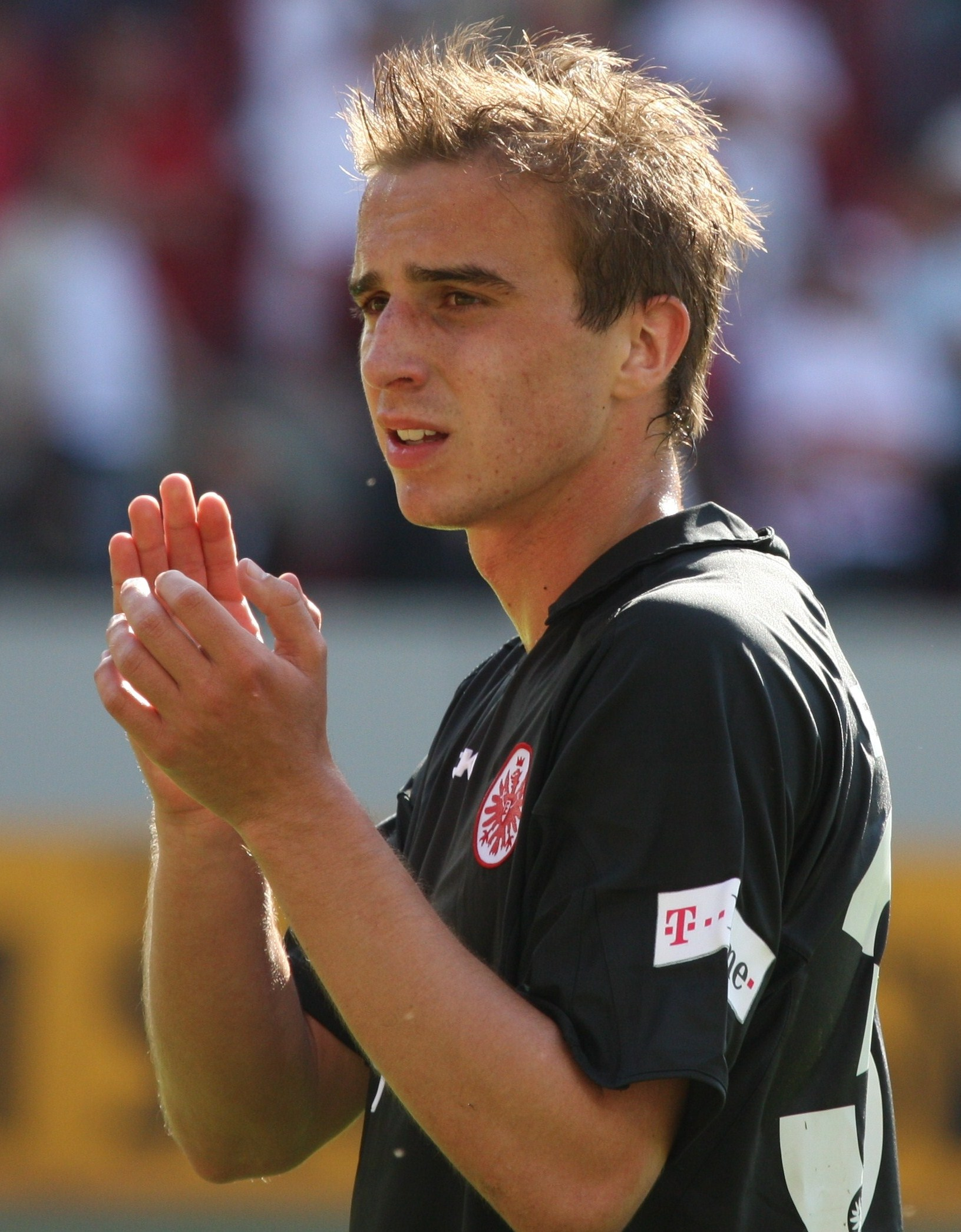 Faton Toski bei Eintracht Frankfurt 2008